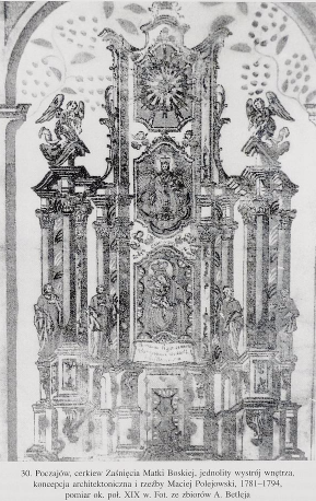 Головний вівтар, василіяни, Почаїв